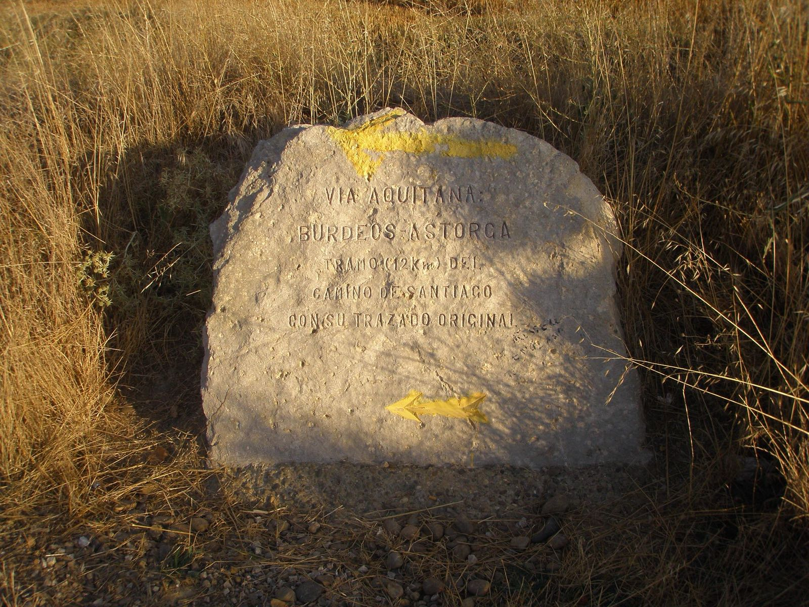 Hito de piedra señalando el reencuentro con la Vía Aquitania a partir de Carrión